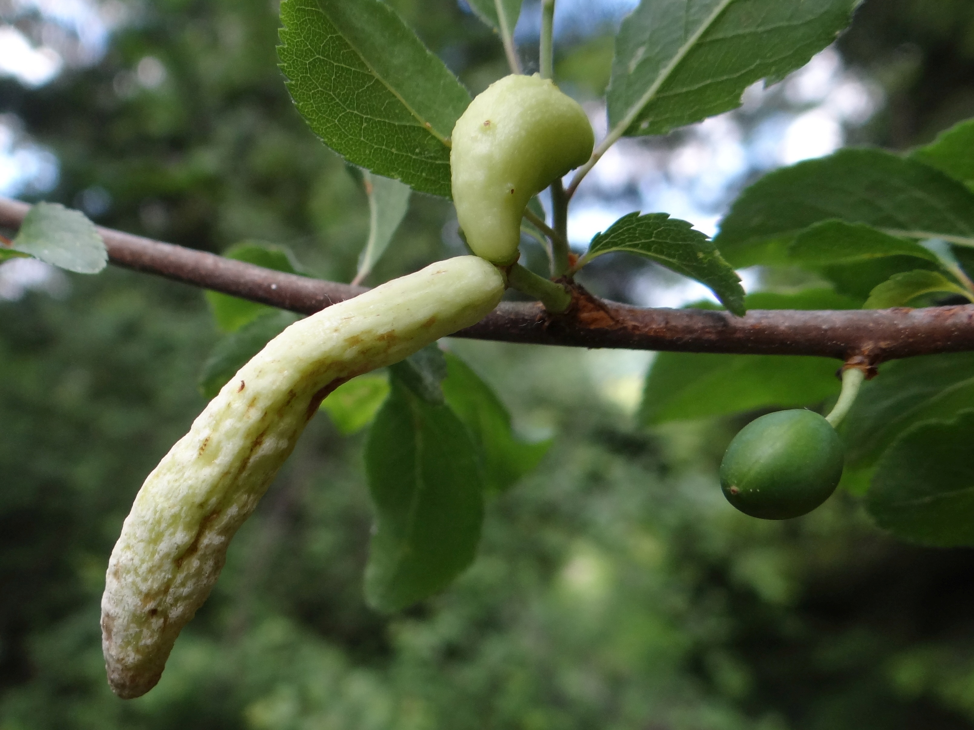 Taphrina pruni on Prunus spinosa